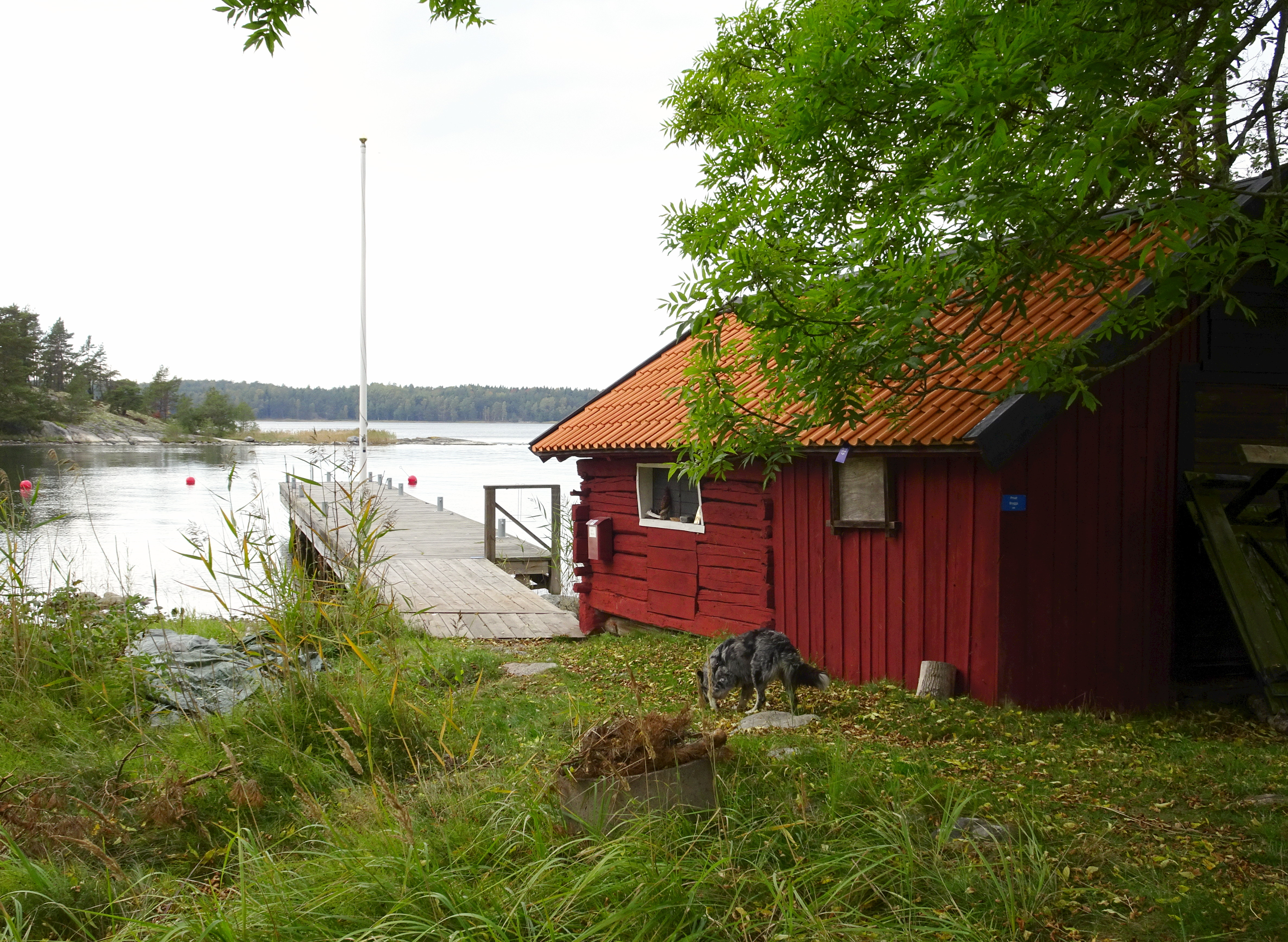 Stugor på Havtornsudd